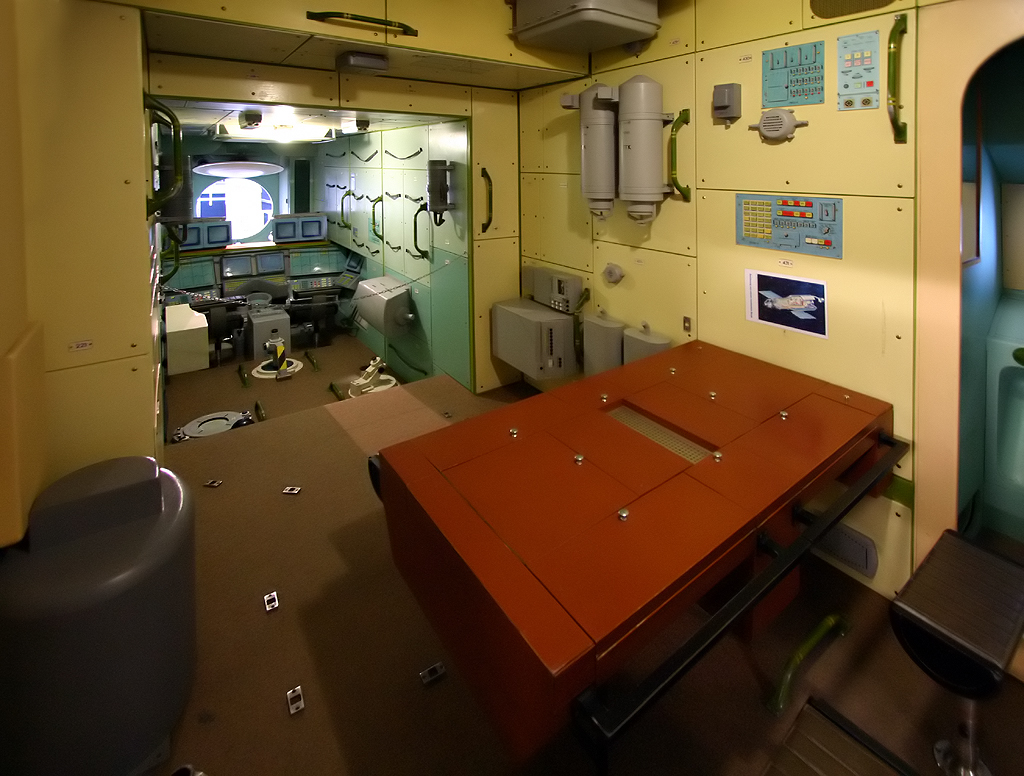 Trainingsmodul der MIR Basisstation in der Raumfahrtausstellung in Morgenröthe-Rautenkranz